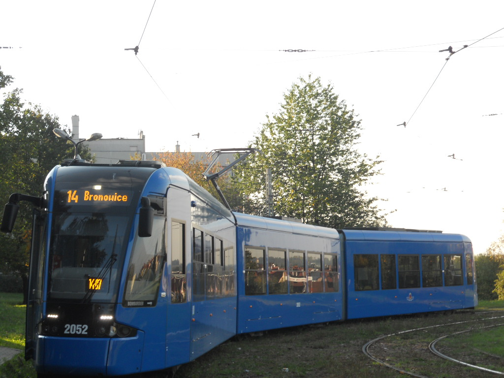 Bombardier NGT8 na pętli Mistrzejowice w Krakowie.